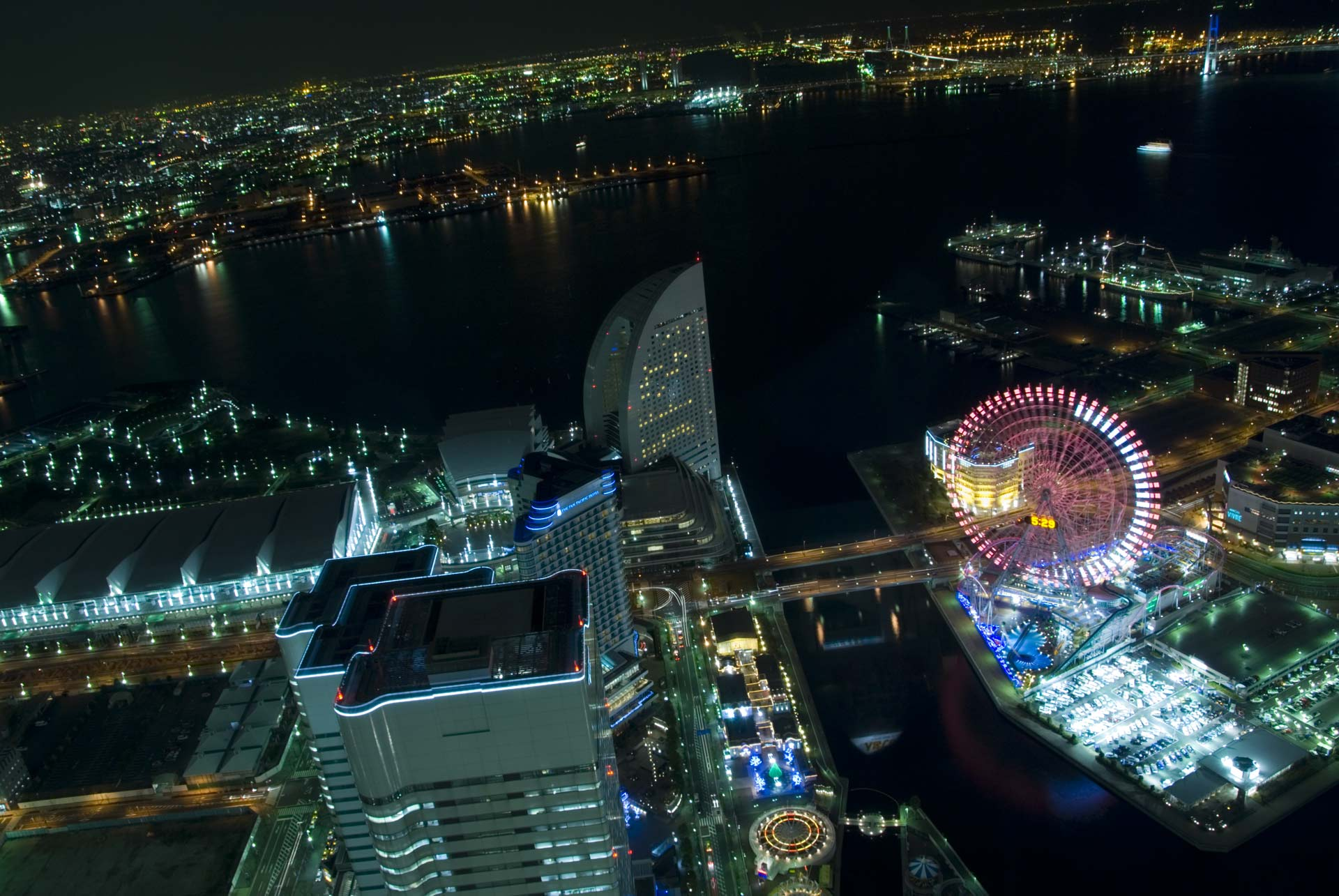 Yokohama at night